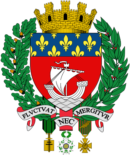 Párizs címere